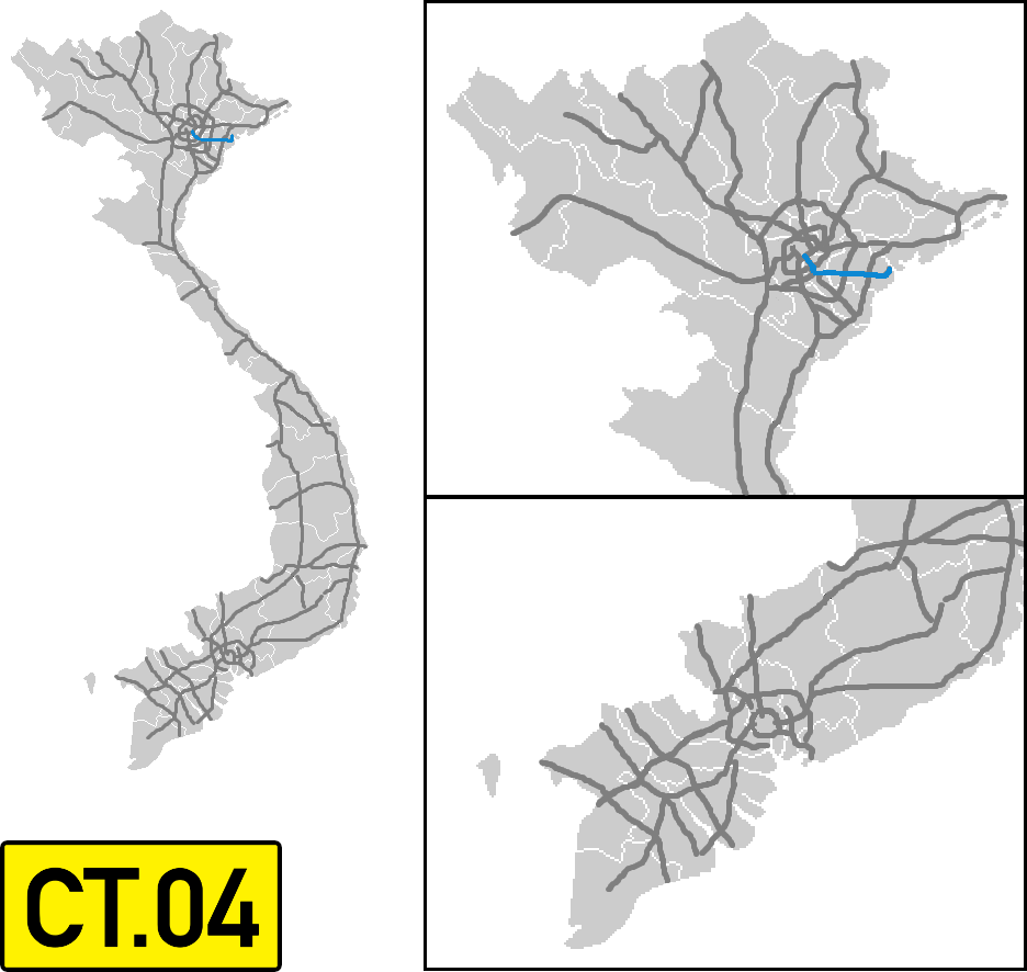 نقشه آزادراه شماره 01، موسوم به آزادراه هانوی هایفونگ